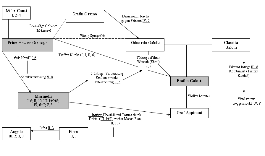 Figurenübersicht zu Lessings "Emilia Galotti"